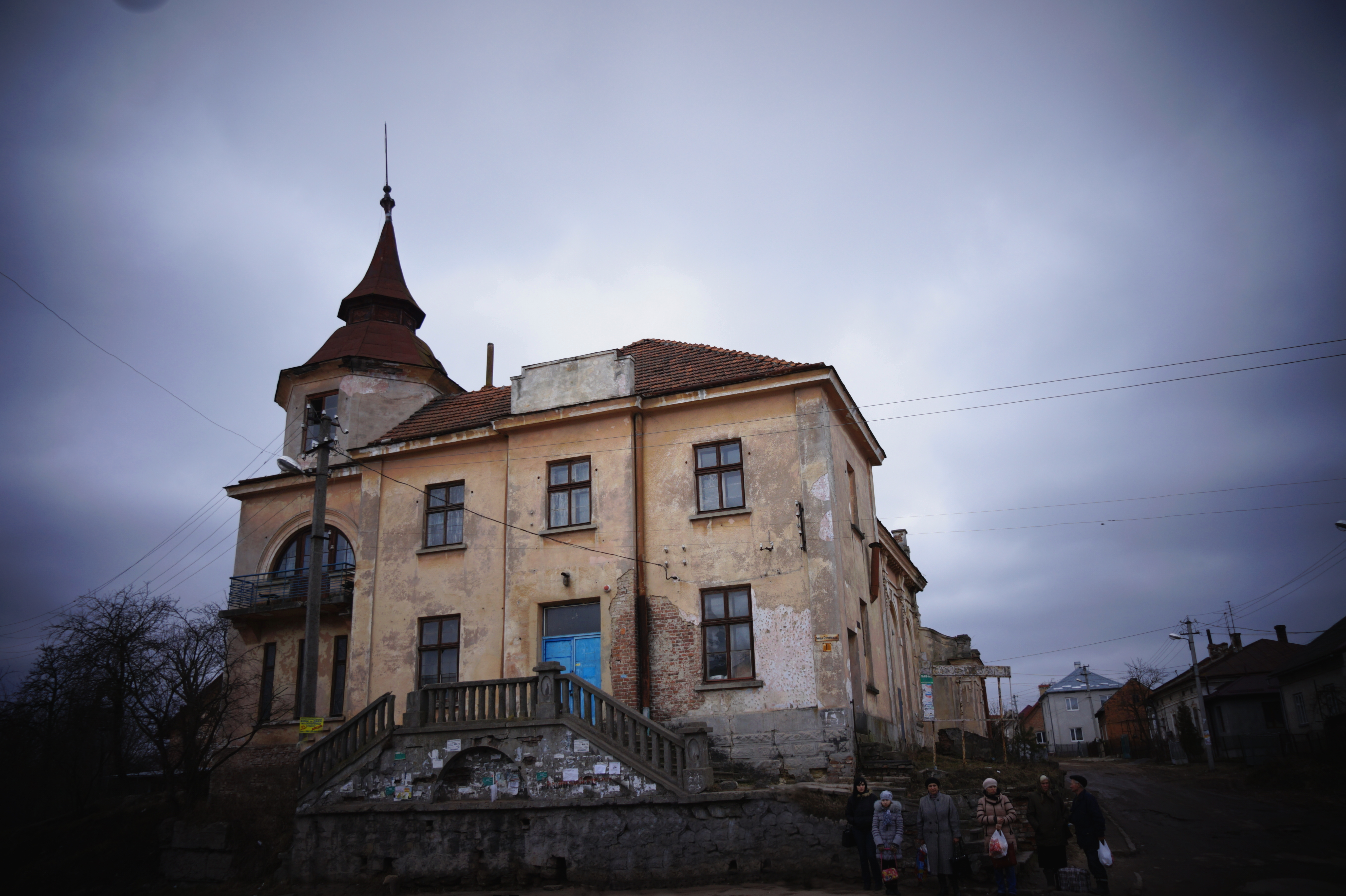 Будинок товариства “Сокіл” (мур.), Бібрка, вул. Шевченка, 15